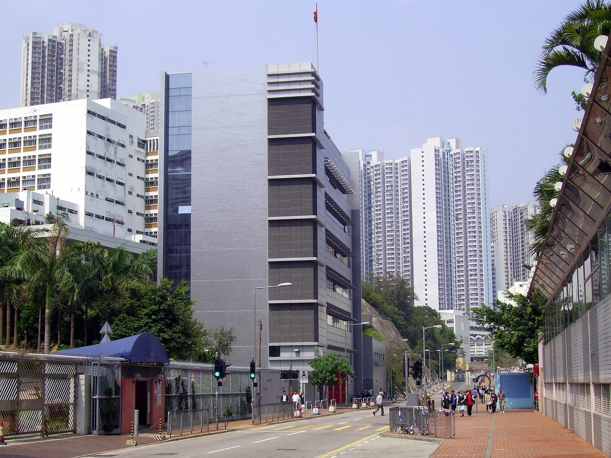 中文（香港）: 葵涌救護站